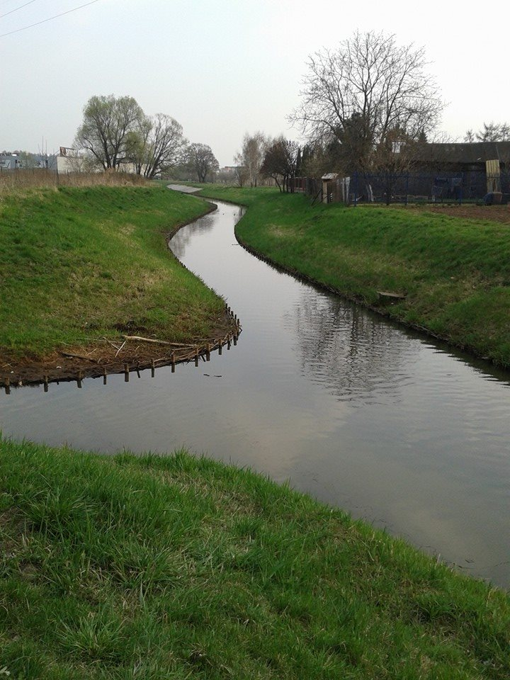 Ujćie Kanału z Lewandowa (po lewej) do Kanału Bródnowskiego